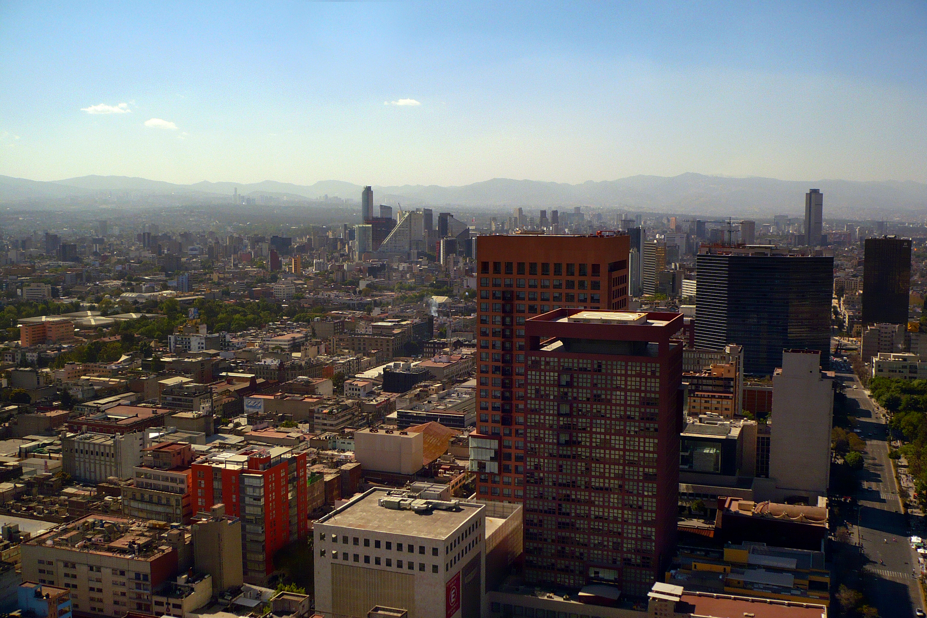 Fotografía tomada desde el mirador de la Torre Latinoamericana